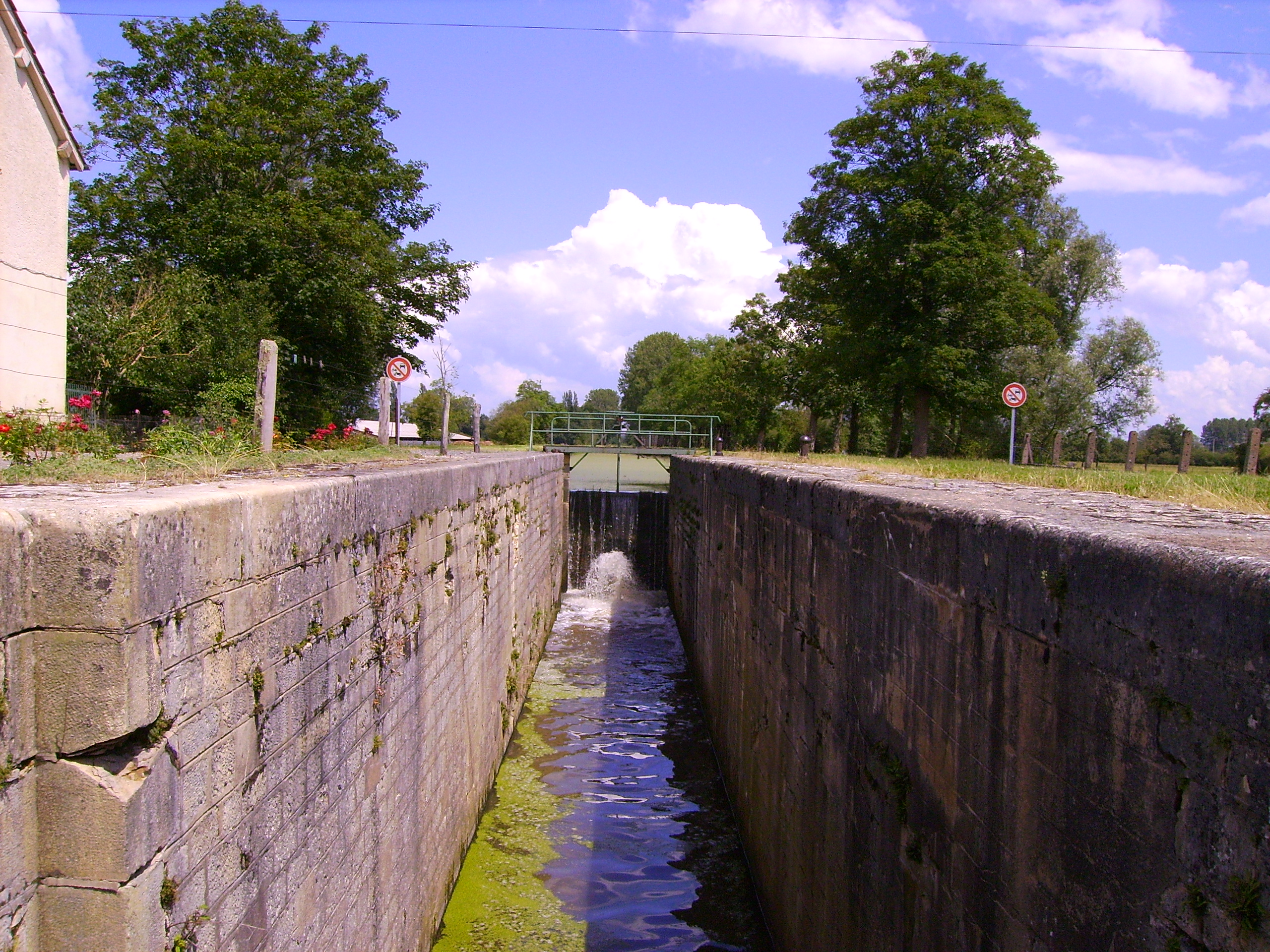 Ancienne écluse de Clairins, sur le canal de Berry à Saint Amand Montrond (Cher)